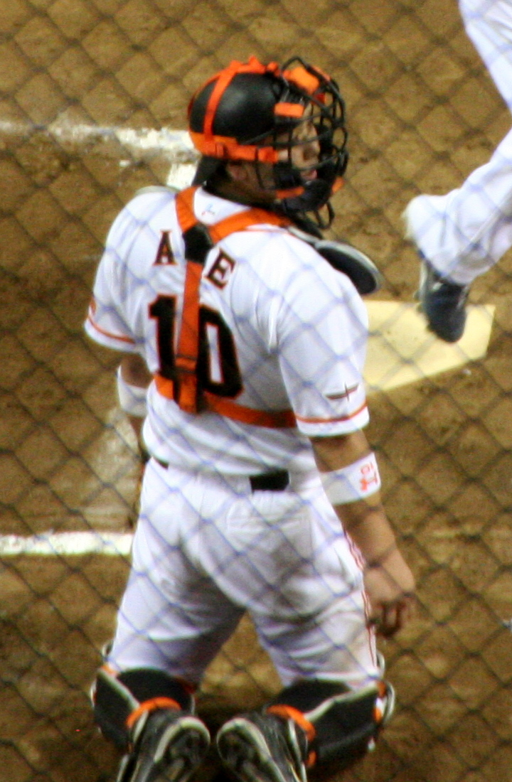 Shinnosuke Abe (阿部慎之助)